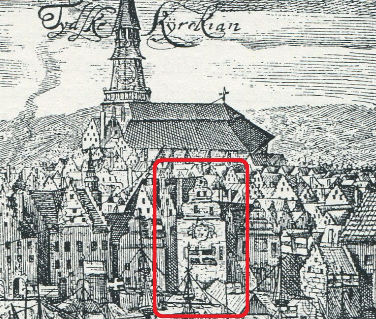 Värdshuset Tre Kronor, fasad mot Skeppsbron